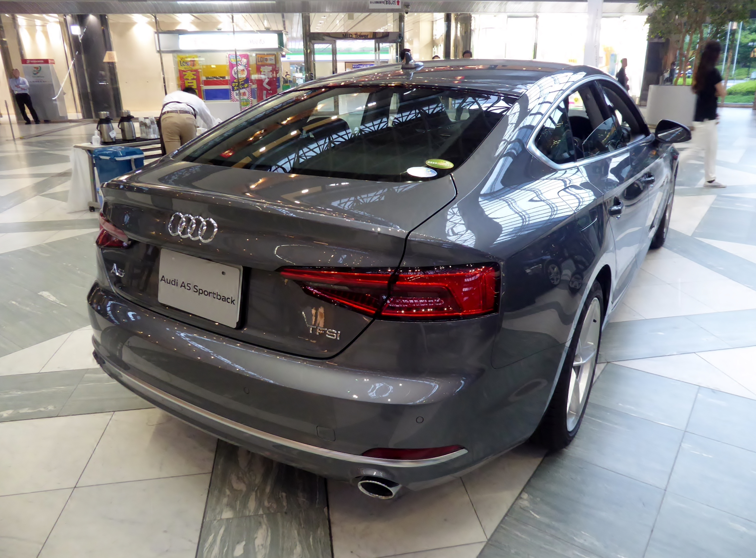 DBA-F5CVKL型アウディ・A5スポーツバック2.0TFSIスポーツをリアから撮影。